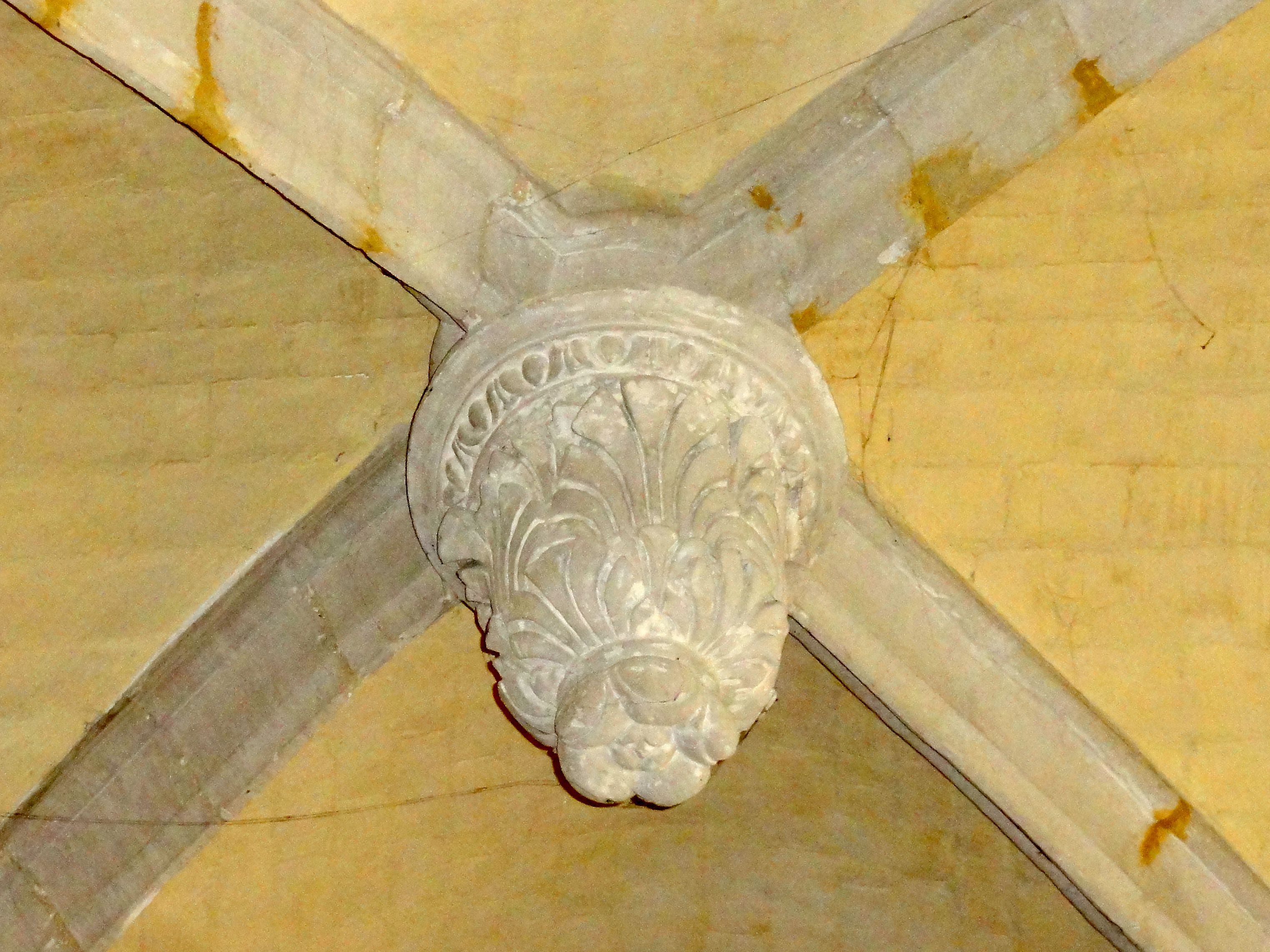 Bas-côté sud, clé de voûte de la 4e travée.